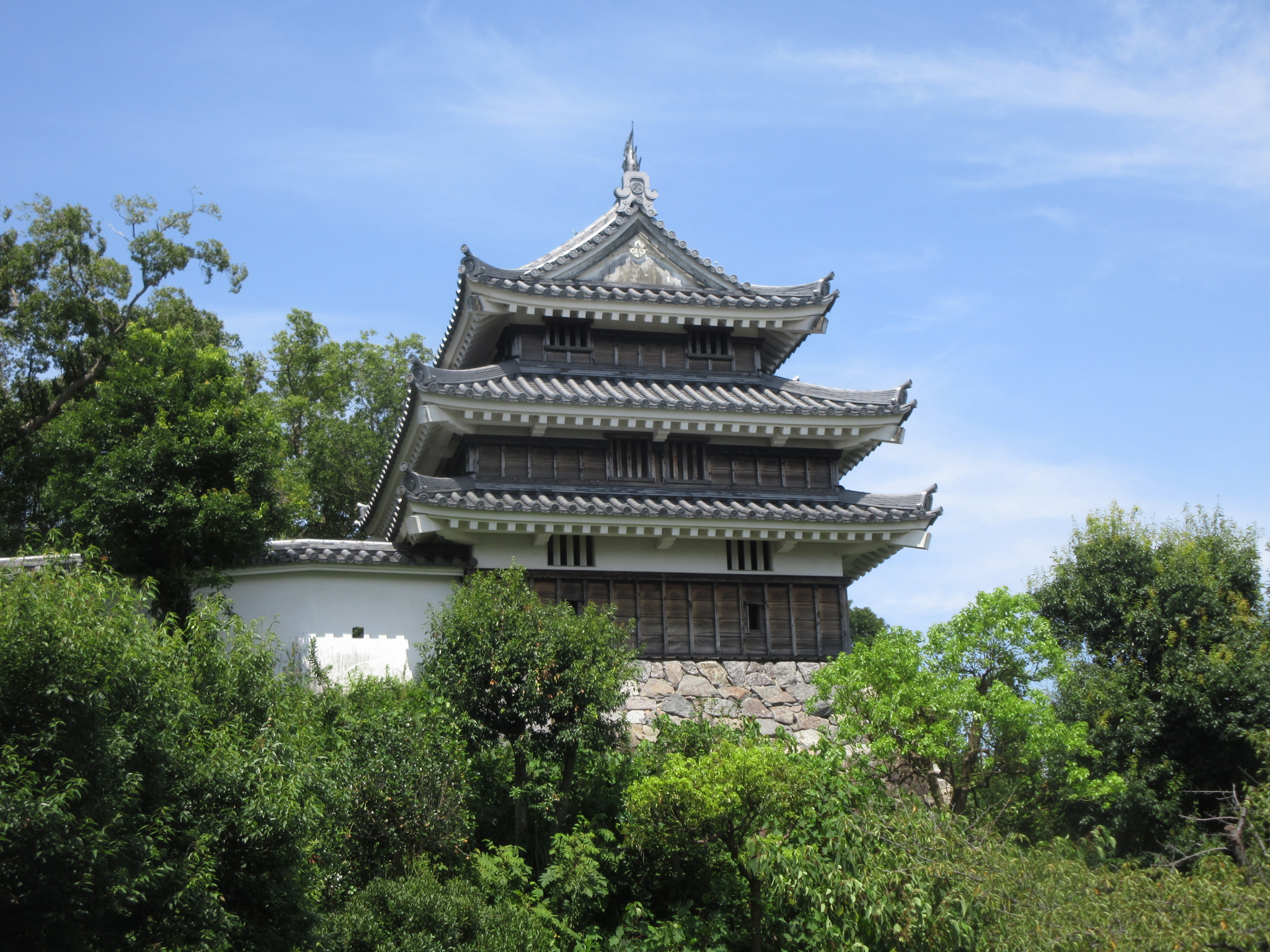 1996年に復元された西尾城本丸丑寅櫓